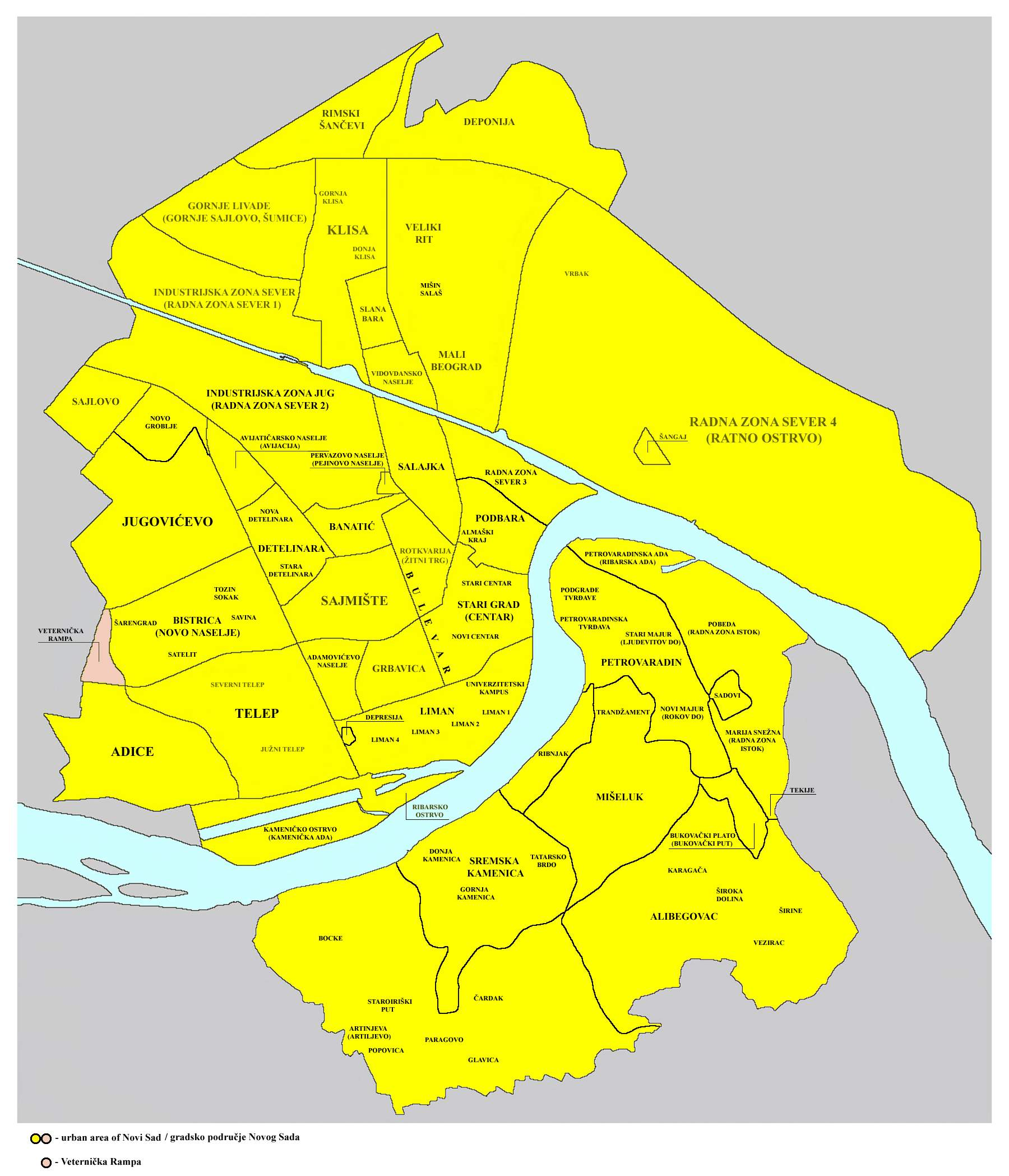 Location of map of Veternička Rampa neighborhood of Novi Sad. Mapa položaja gradske četvrti Veternička Rampa u Novom Sadu.